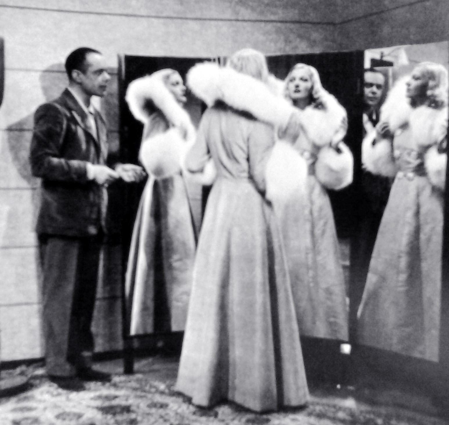 Luigi Zerbinati ed Isa Miranda in "E' caduta una donna" (Guarini, 1941)